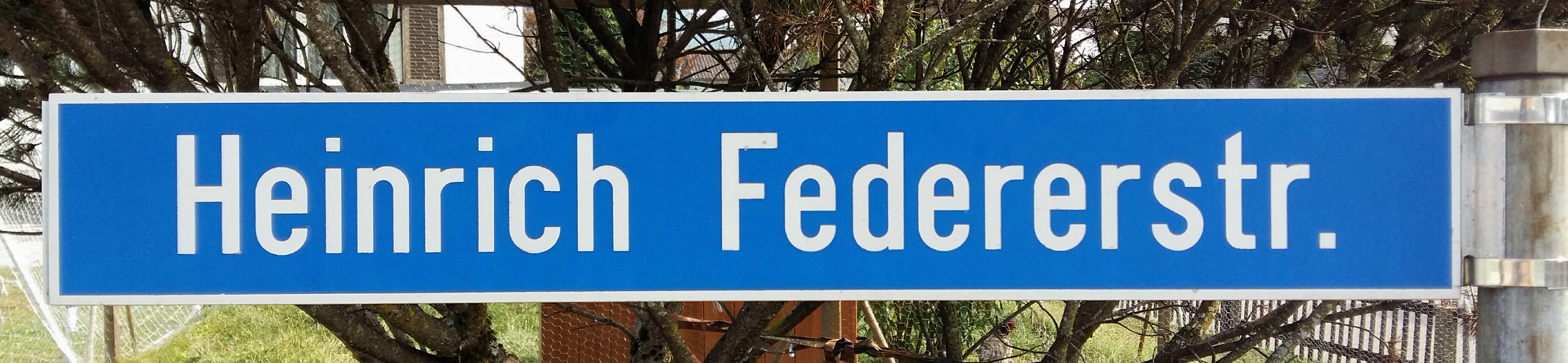 Die Heinrich Federerstrasse in Berneck ist benannt nach dem Schweizer Schriftsteller der dort Heimatberechtigt war.